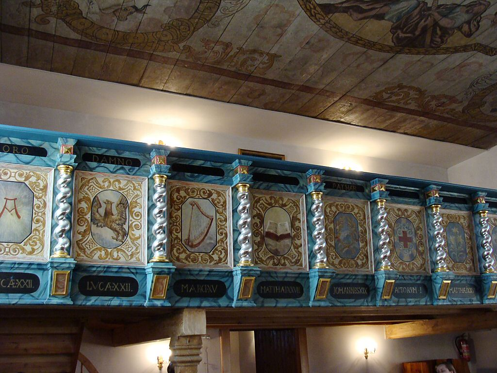 Kościół Św. Trójcy - Szczecin Krzekowo